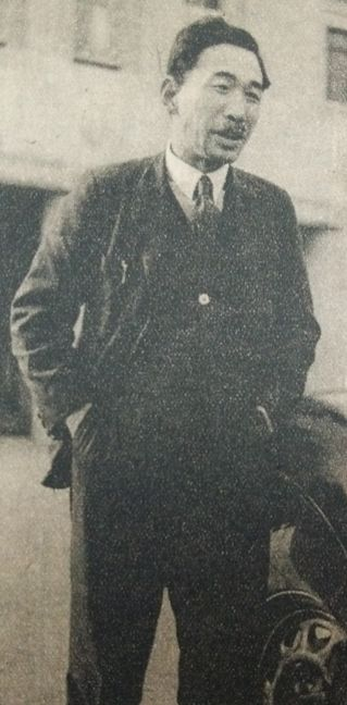 板垣守正